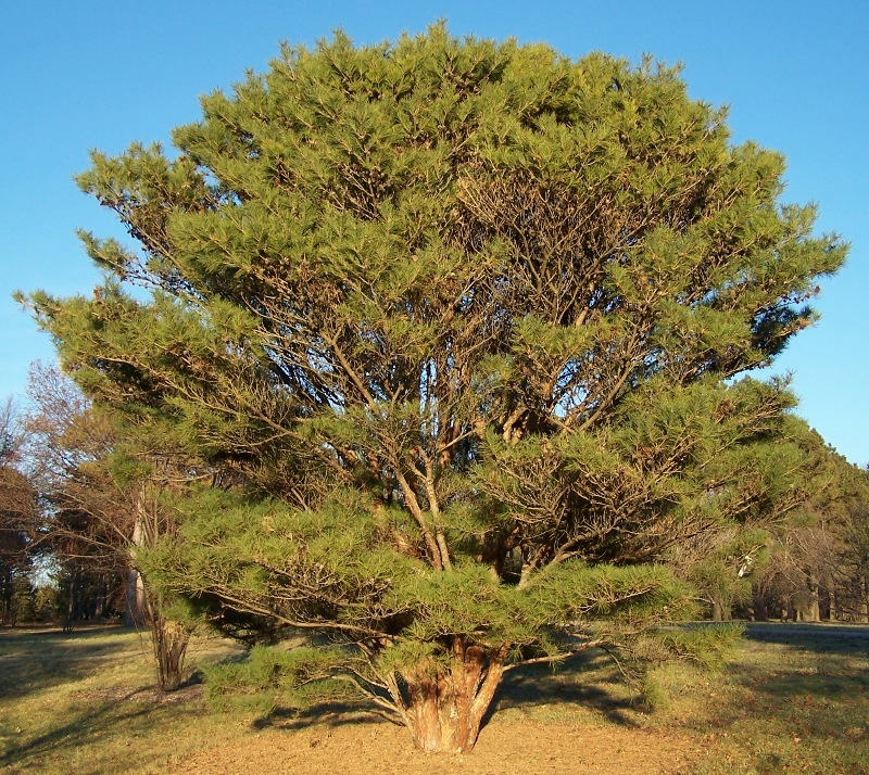 Japanese Red Pine (Tanyosho Pine) - Pinus densiflora 'Umbraculifera' cultivar.